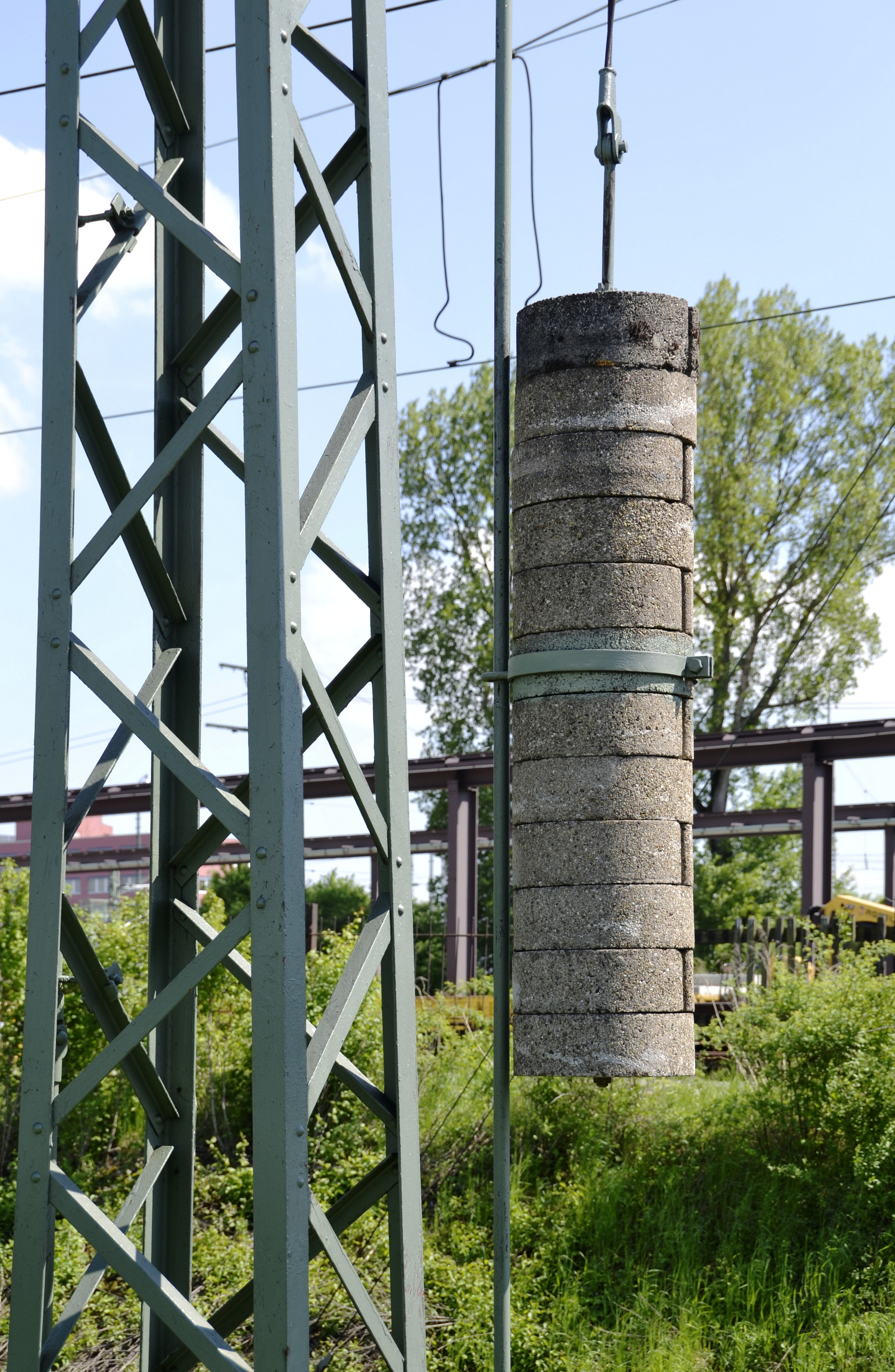 Zuggewichte an einem Oberleitungsmast an einer Eisenbahnlinie.